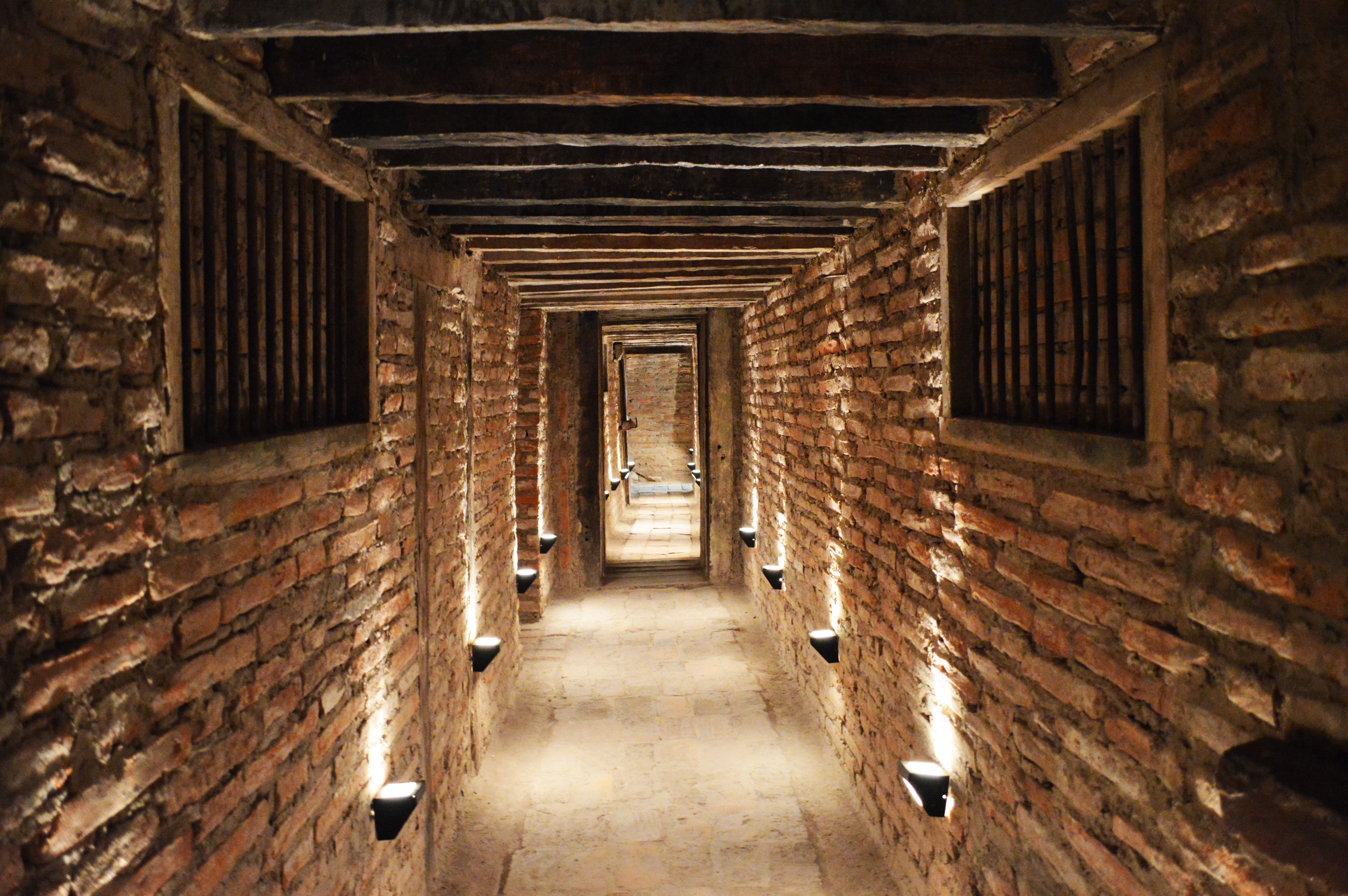 Túnel subterráneo en el Centro Cultural del Bicentenario de Santiago del Estero, Argentina.